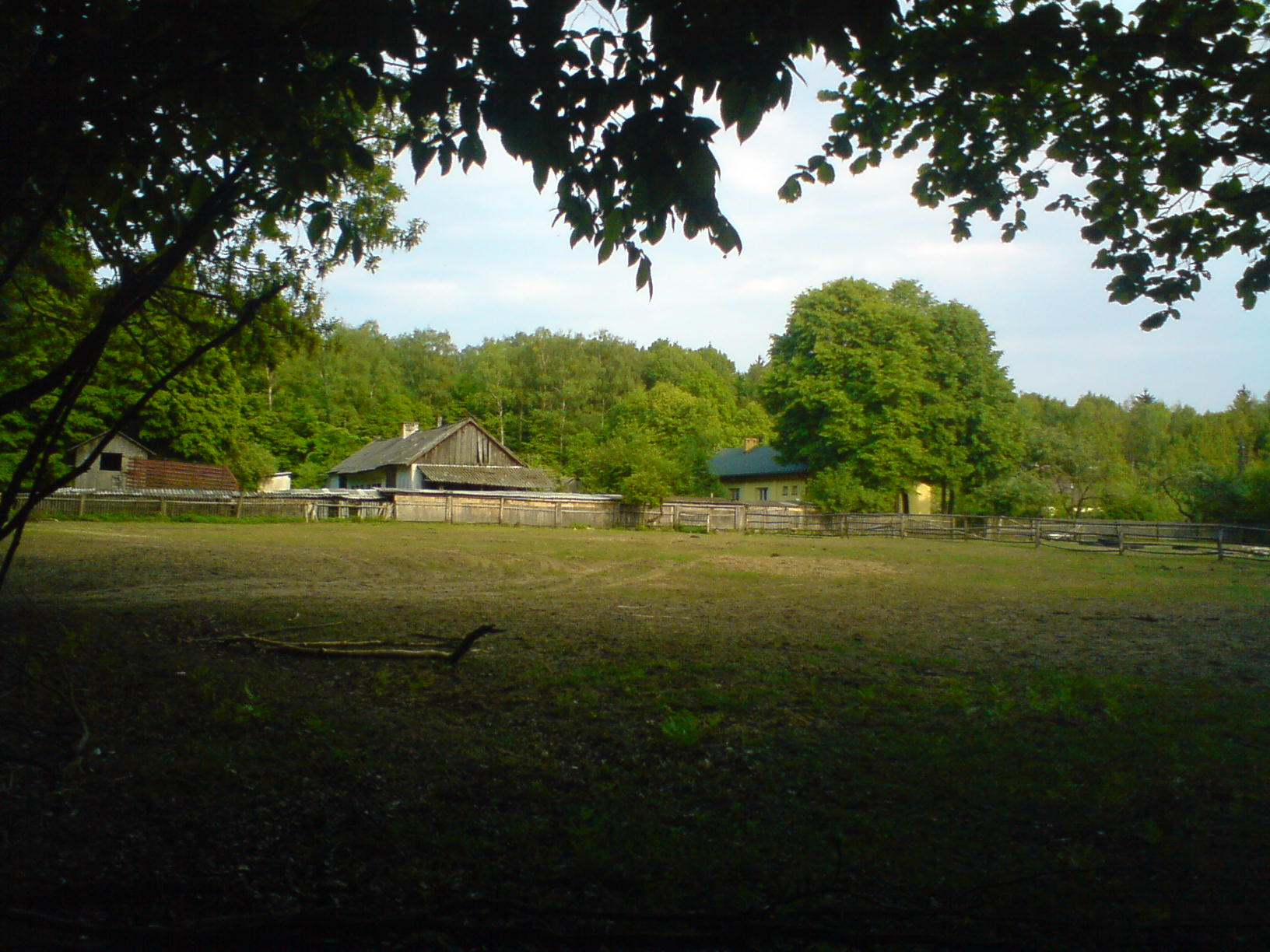 Sacharewo - gospodarstwo agroturystyczne